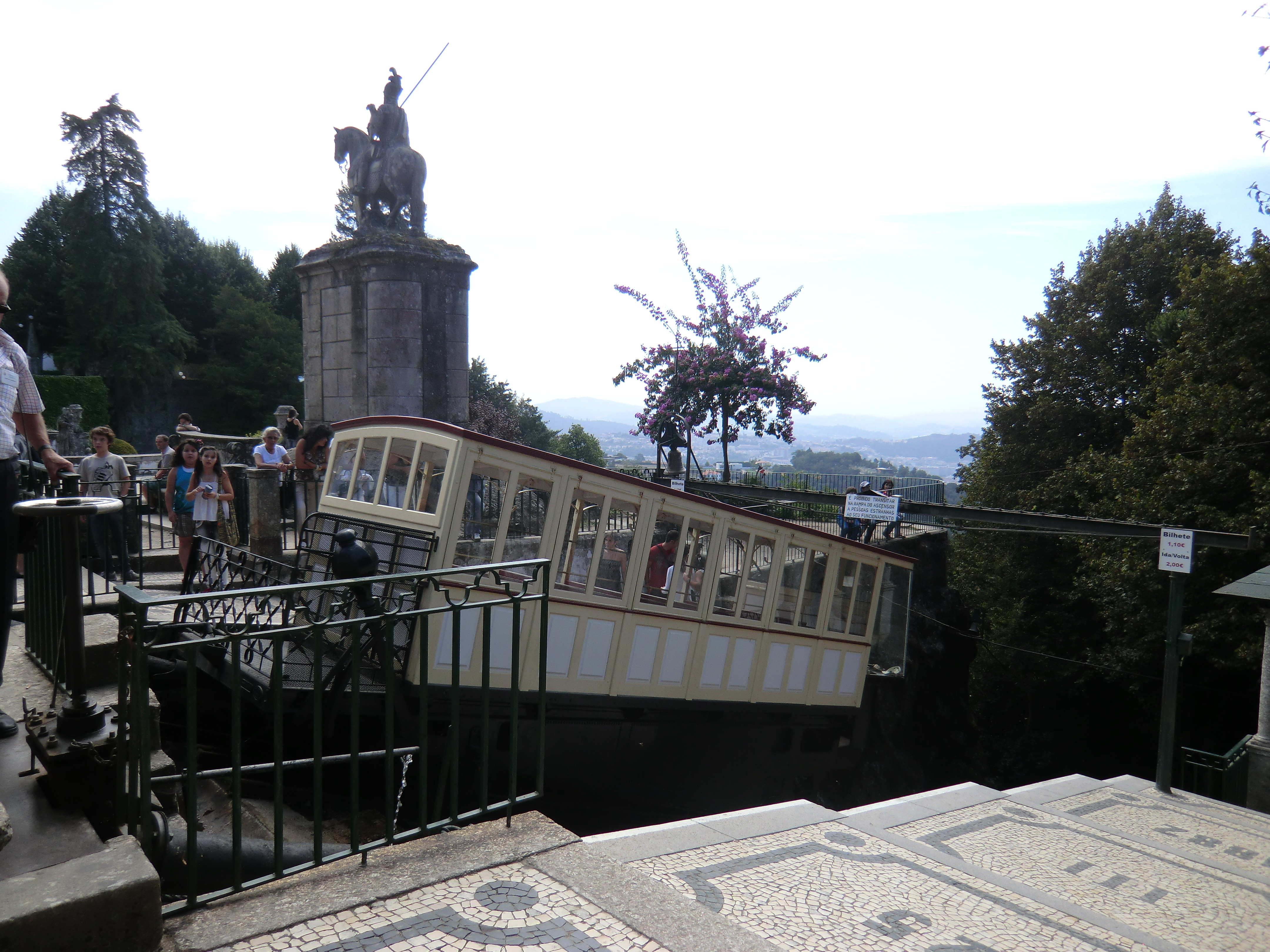 Elevador do Santuário do Bom Jesus, Braga